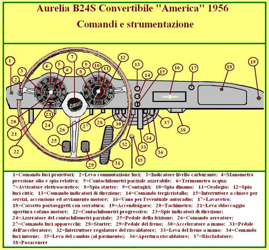 Disegno eseguito dal sottoscritto (Giomayo) utilizzando il programma "Paint" di Windows e traendo ispirazione per i particolari da una immagine (fotografia) che appare a pagina 15 del numero 2 (febbraio 1987) della rivista "GT Granturismo e Competizione"